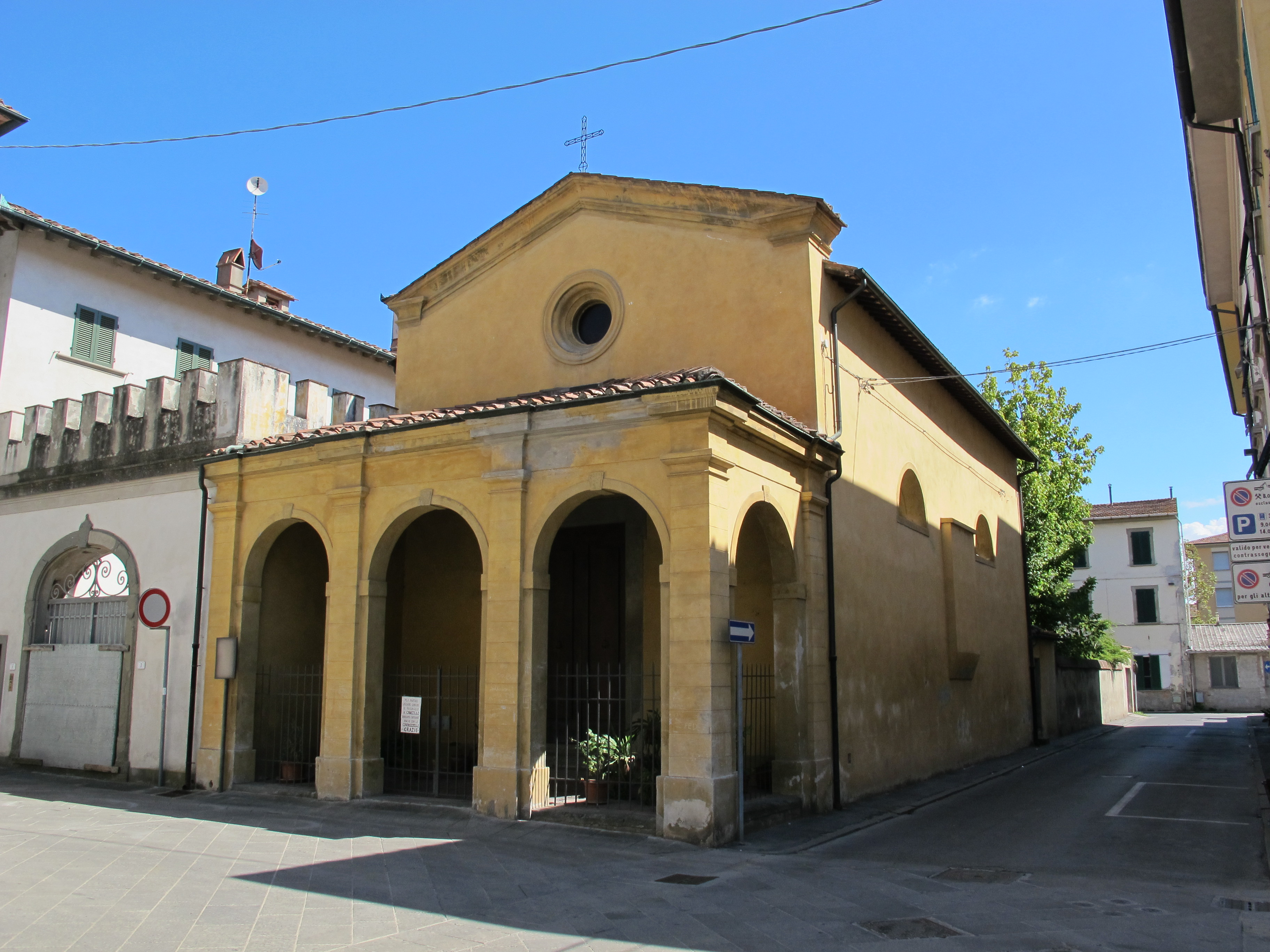 Castelfranco di sotto, Chiesa di Santa Maria Maddalena (La Badia)